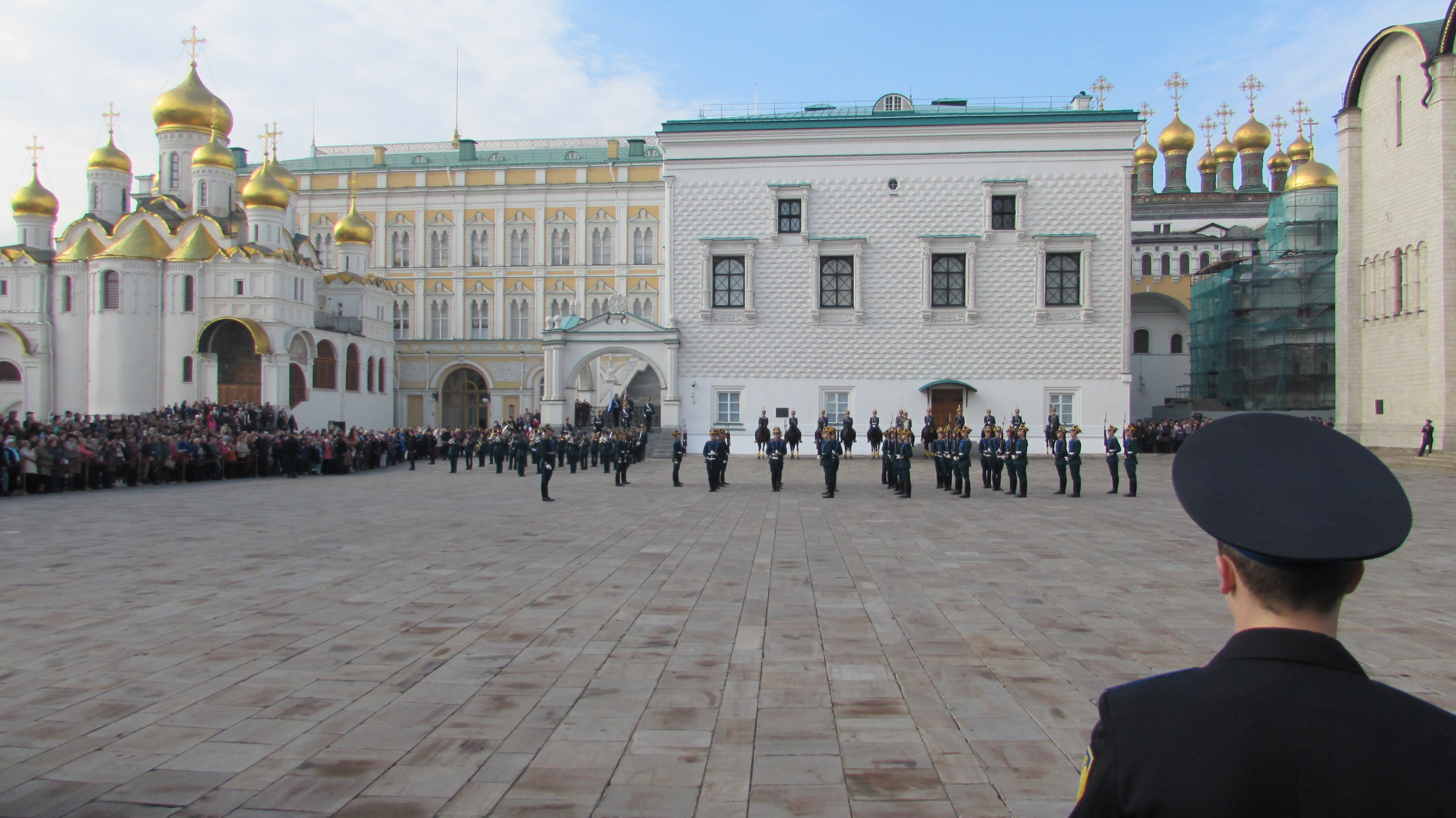 Moskau Kreml Kathedralenplatz Parade